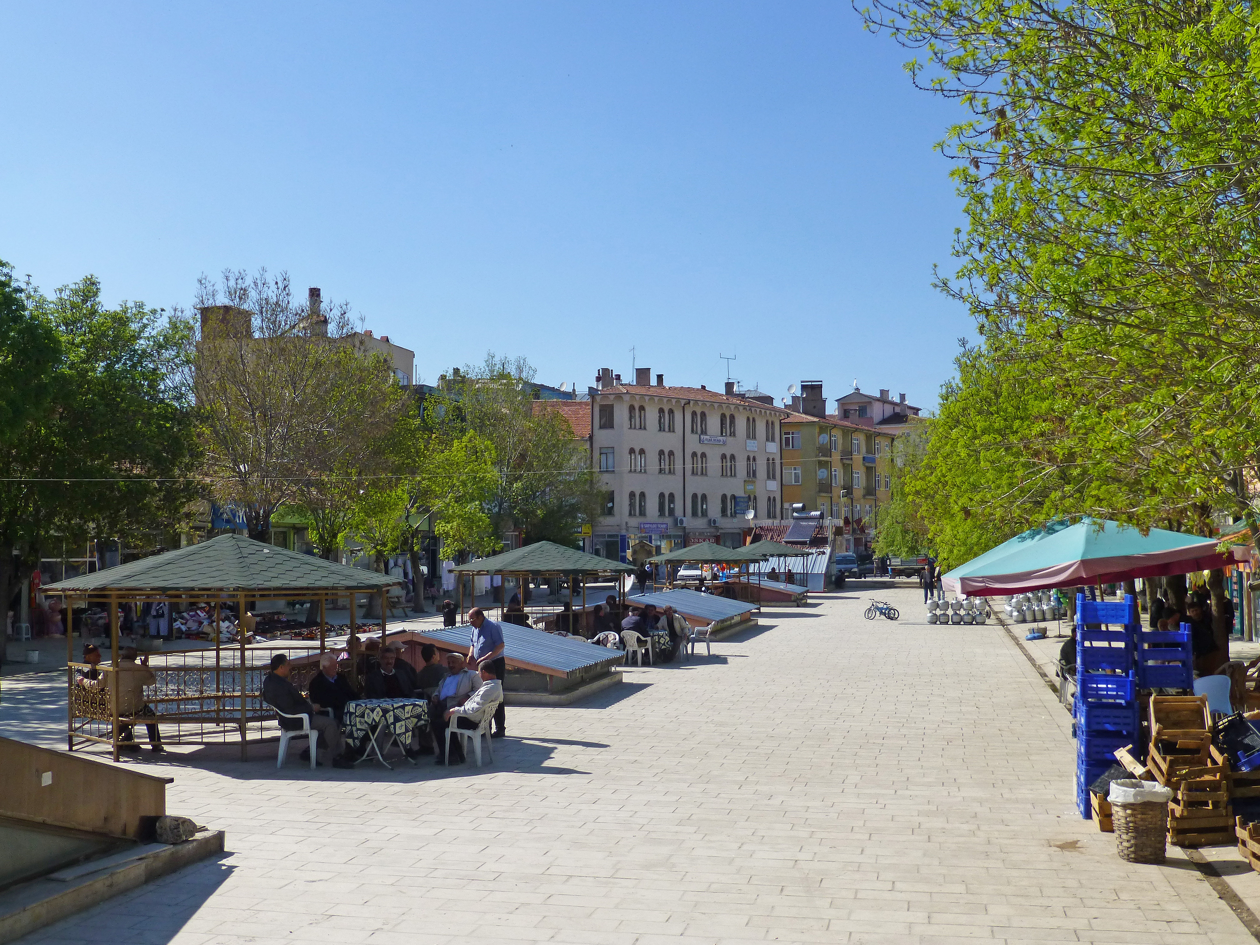 Une place à Mucur (province de Kırşehir, Anatolie centrale, Turquie)